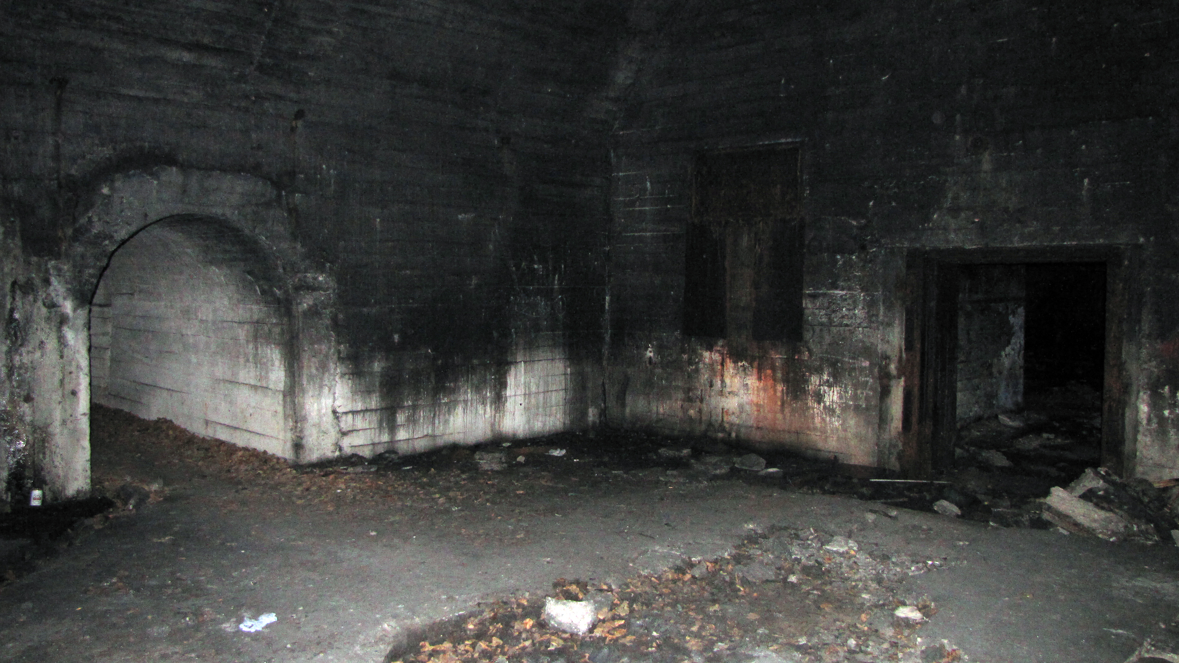 Peeter Suure merekindluse laskemoonalaod (ladu III), 1917. a, Astangu